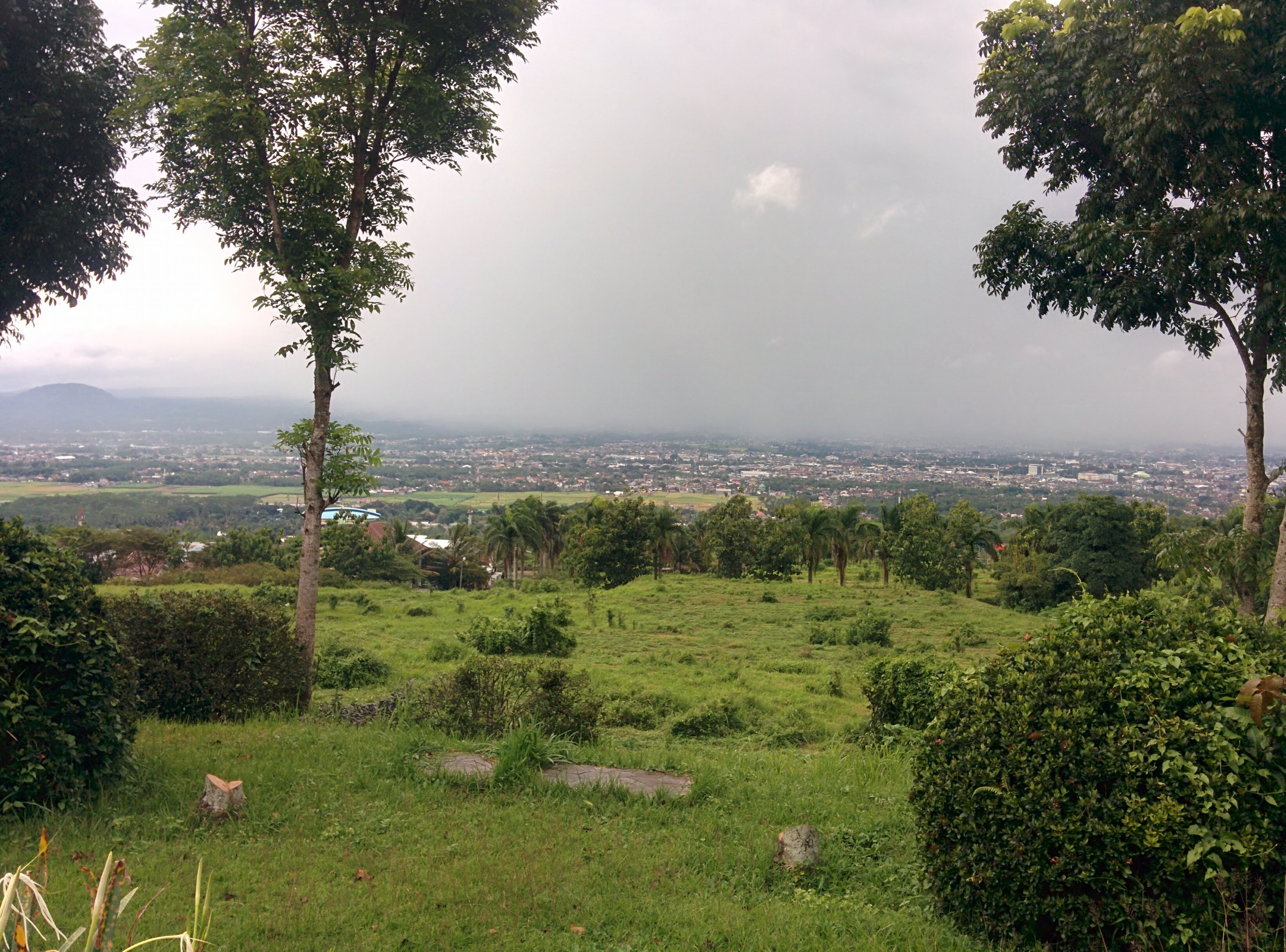 View of Kedungkandang, Malang from Buring hills